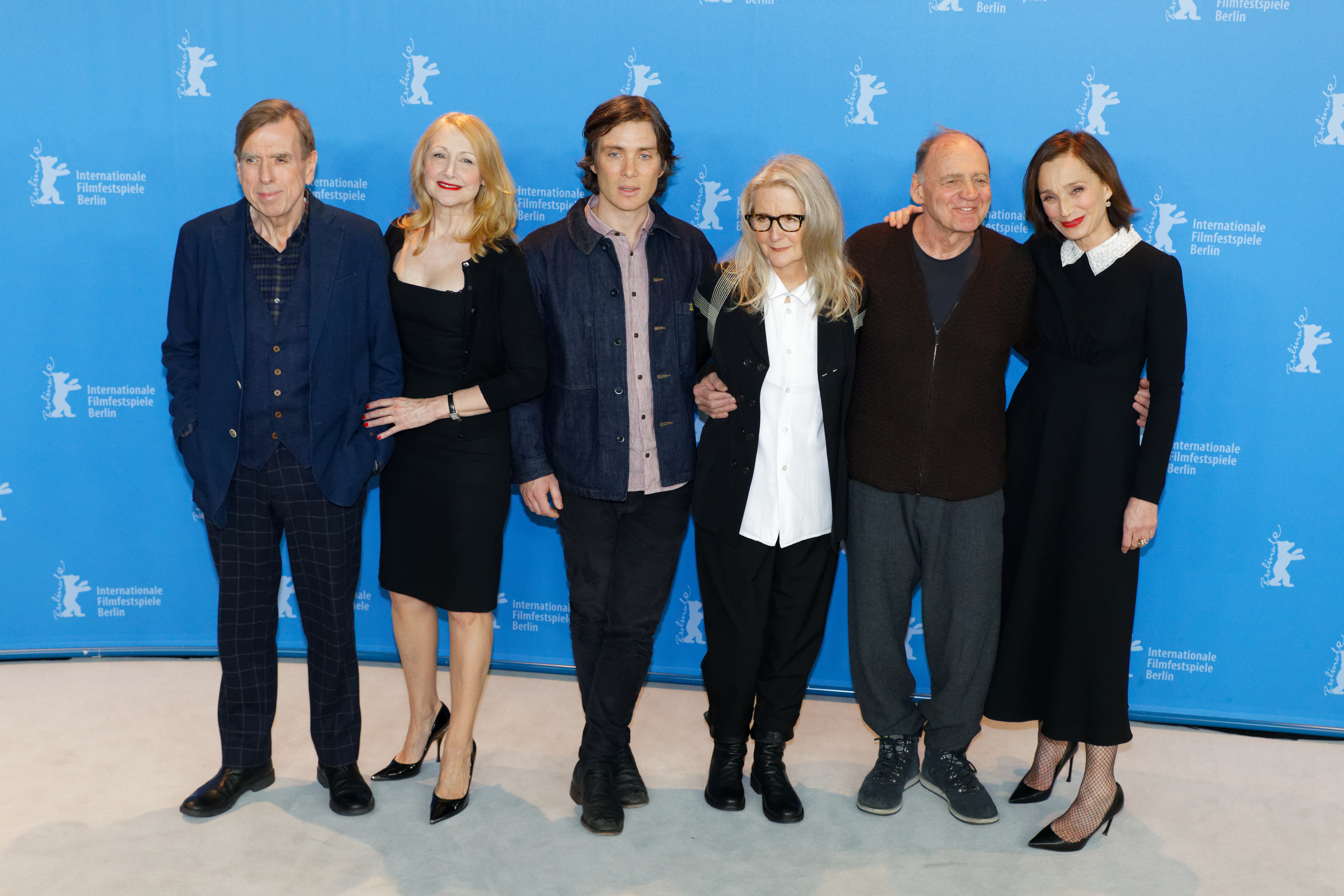 Sally Potter & Cast beim Photo Call zu The Party bei der Berlinale 2017 v.l.n.r. Timothy Spall (Schauspieler/Actor) Patricia Clarkson (Schauspielerin/Actress) Cillian Murphy (Schauspieler/Actor) Sally Potter (Regisseurin, Drehbuchautorin/Director, Screenwriter) Bruno Ganz (Schauspieler/Actor) Kristin Scott Thomas (Schauspielerin/Actress)